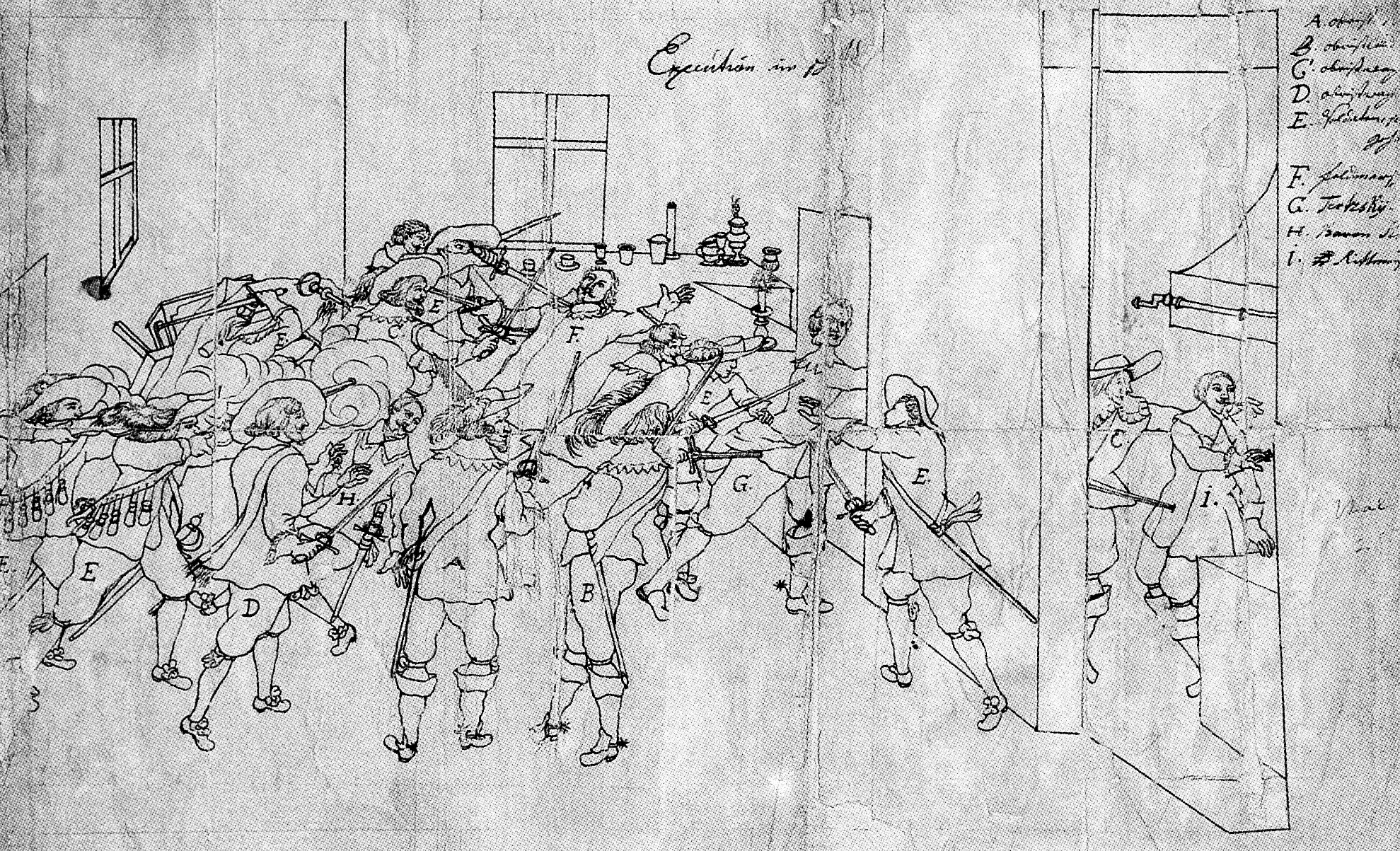 Ermordung der Offiziere Wallensteins, Federzeichnung ohne Jahresangabe